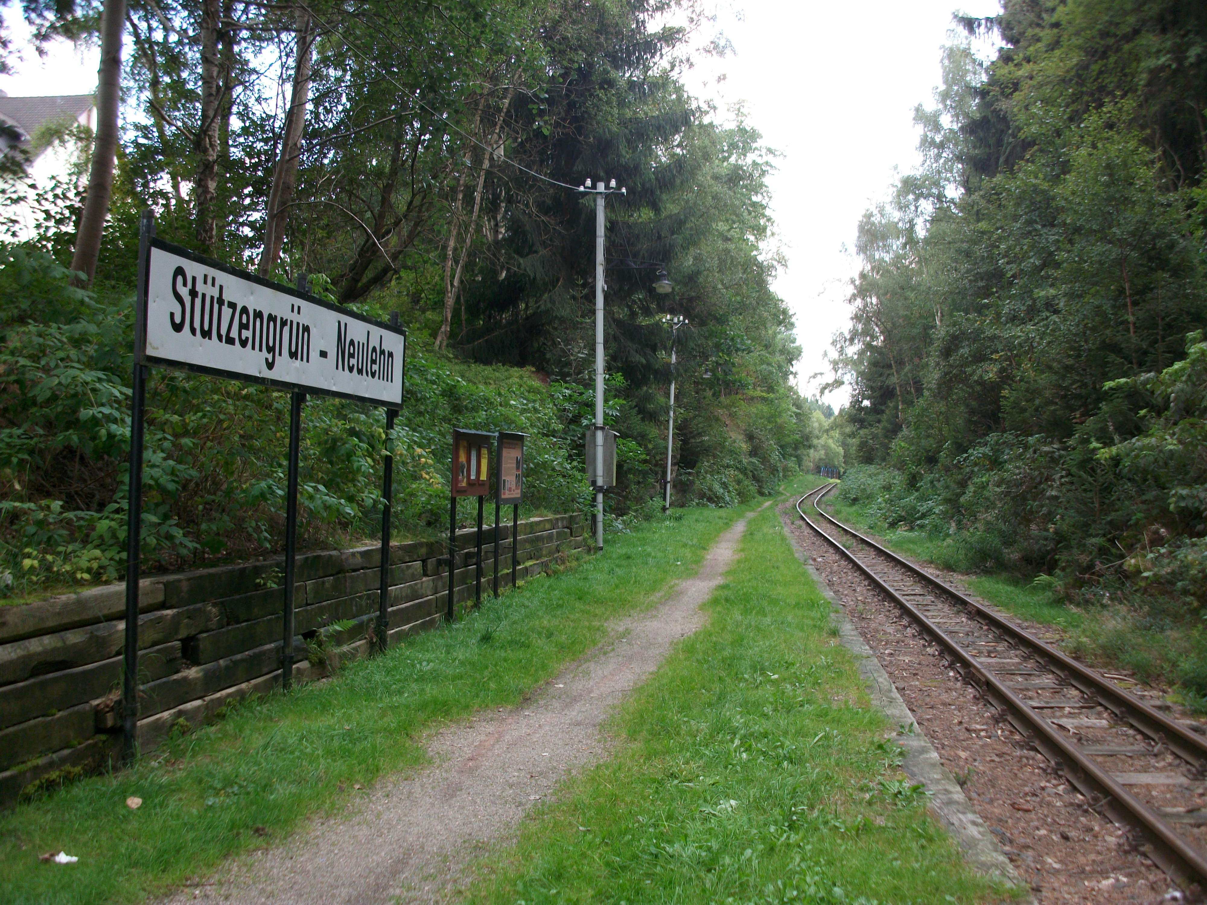 Hp Stützengrün-Neulehn (2017)